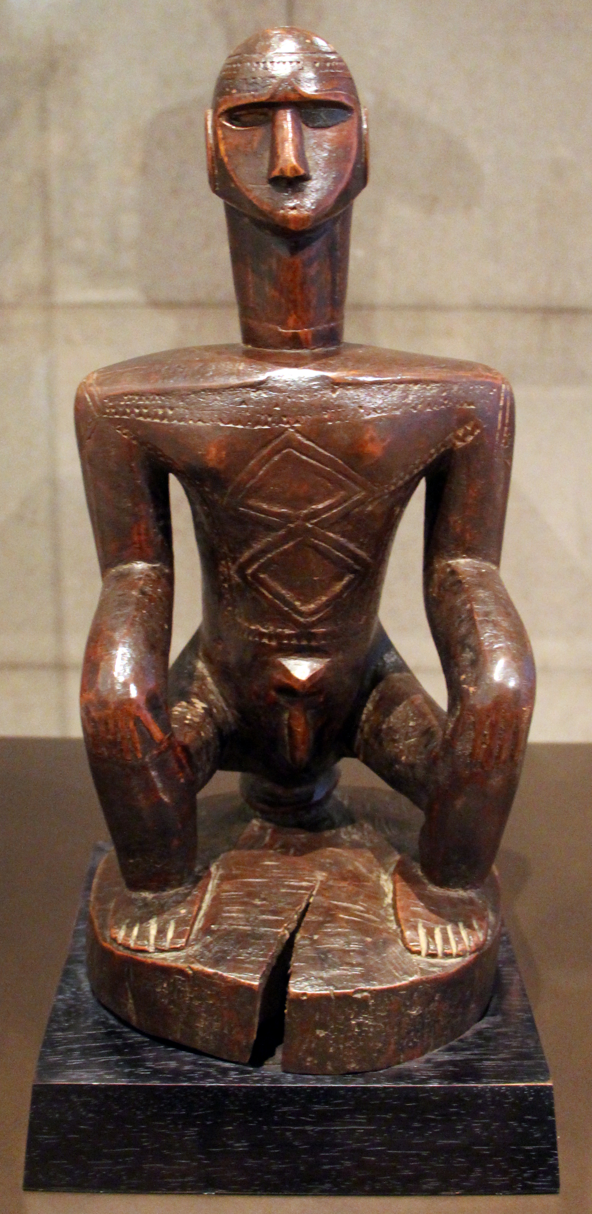 Arts of Africa in the Louvre - Room 1